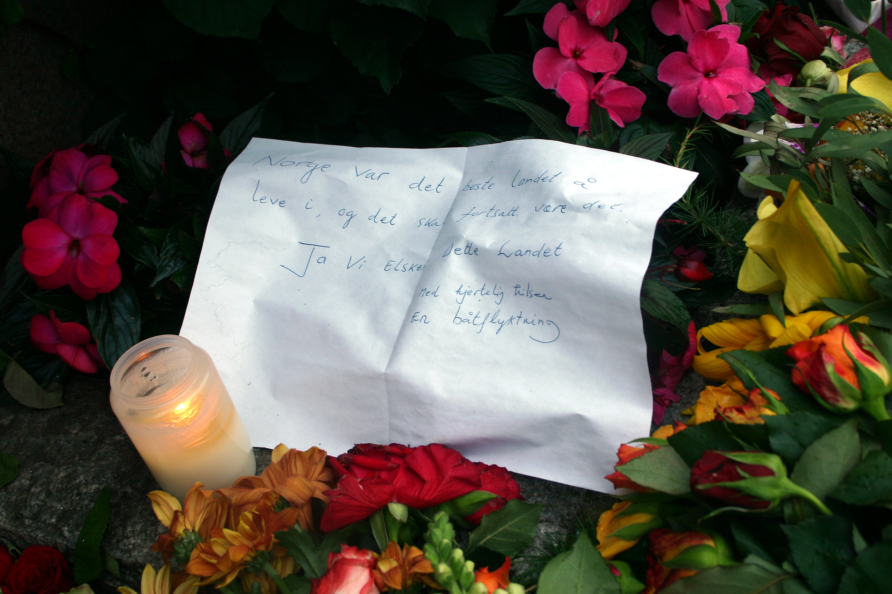 Norge var det beste landet å leve i, og det skal fortsatt være det. Ja Vi Elsker Dette Landet. Med hjertelig hilsen En båtflyktning